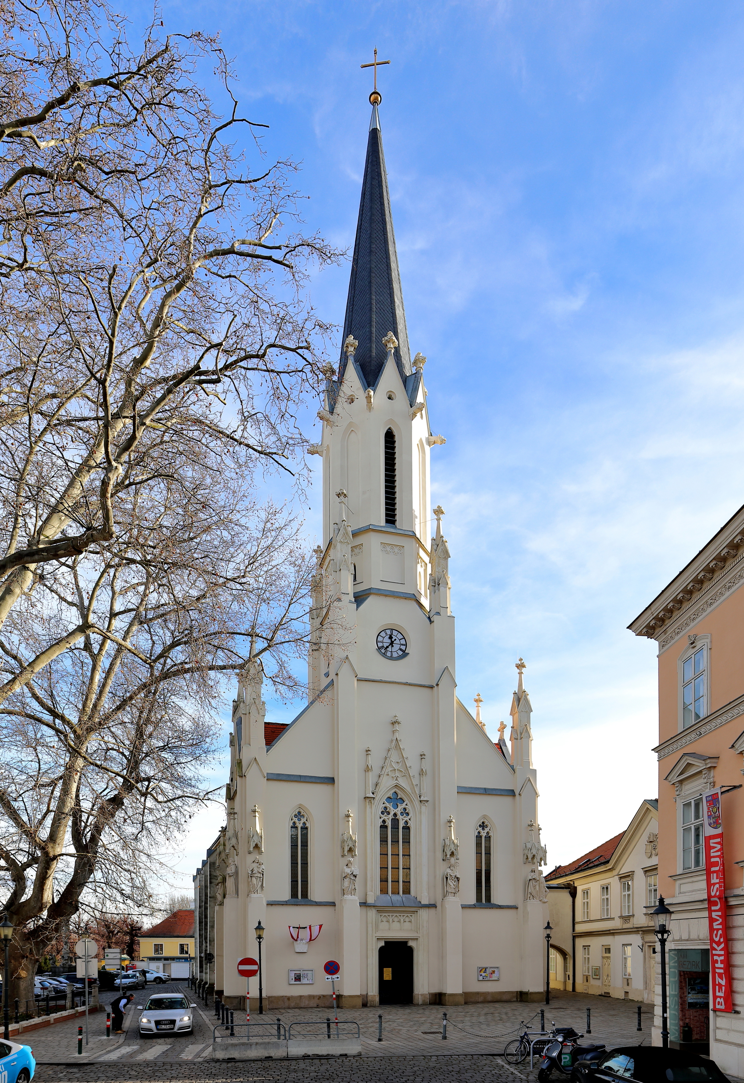 Westansicht der röm.-kath. Pfarr- und Wallfahrtskirche Maria Hietzing im 13. Wiener Bezirk Hietzing.Nach Zerstörung der Vorgängerkirche 1683 durch die Türken wurde sie 1685 neu aufgebaut. Mitte des 19. Jahrhunderts (um 1865) wurde das Gotteshaus umgebaut und nach den Plänen von Carl Roesner Richtung Westen erweitert. Dabei wurden die Westfassade und der Glockenturm im neugotischen Stil errichtet.